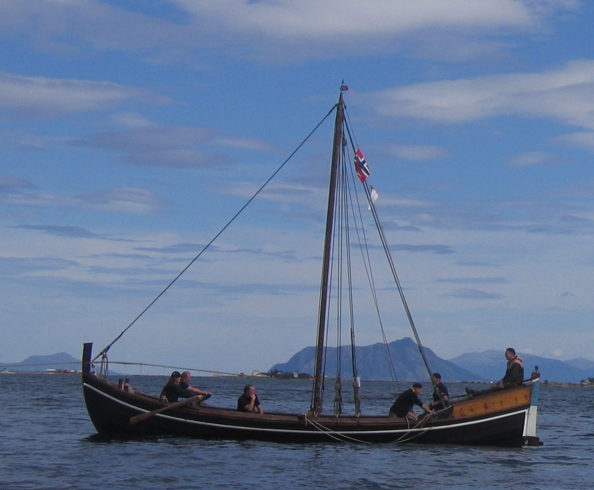 Bakkejekta på Kystenstemne 2008